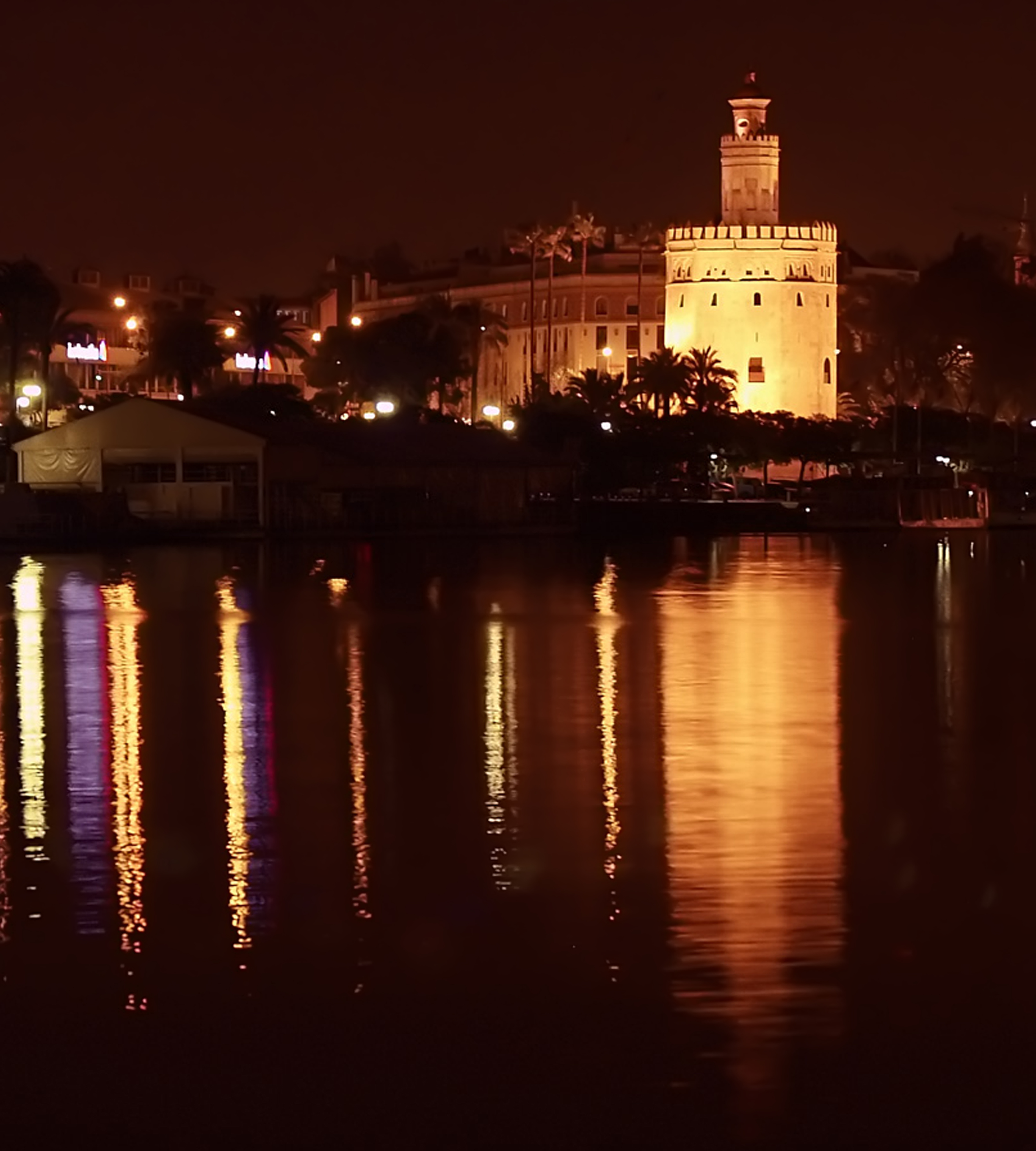 Vista nocturna de la Torre del Oro desde el Puente de san Telmo.